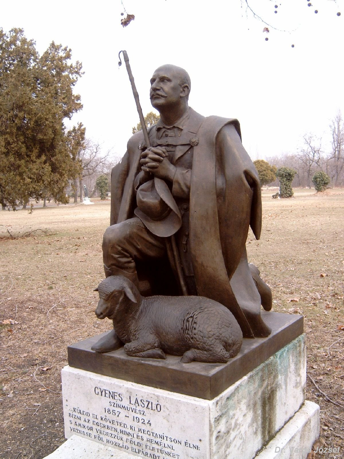 Gyenes László (Fegyvernek v. Monostor, 1857. március 7. – Budapest, 1924. november 7.) drámai színész sírja Budapesten. Kerepesi temető: 45-1-97 [szobrász: Szentgyörgyi István].